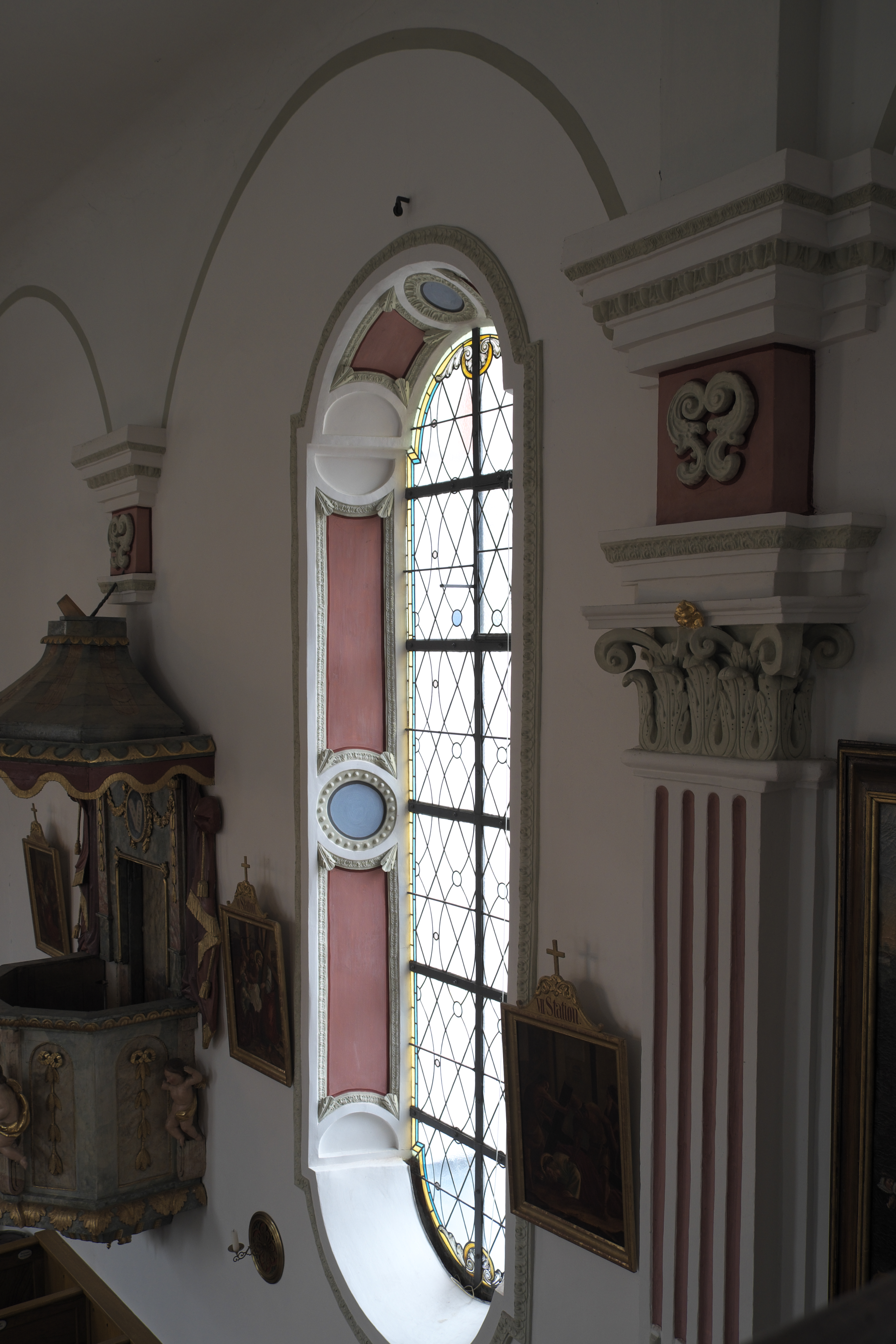 Katholische Wallfahrtskirche Heilig Blut in Einsbach, einem Ortsteil von Sulzemoos im Landkreis Dachau (Bayern/Deutschland), ovales Fenster mit Stuckdekor